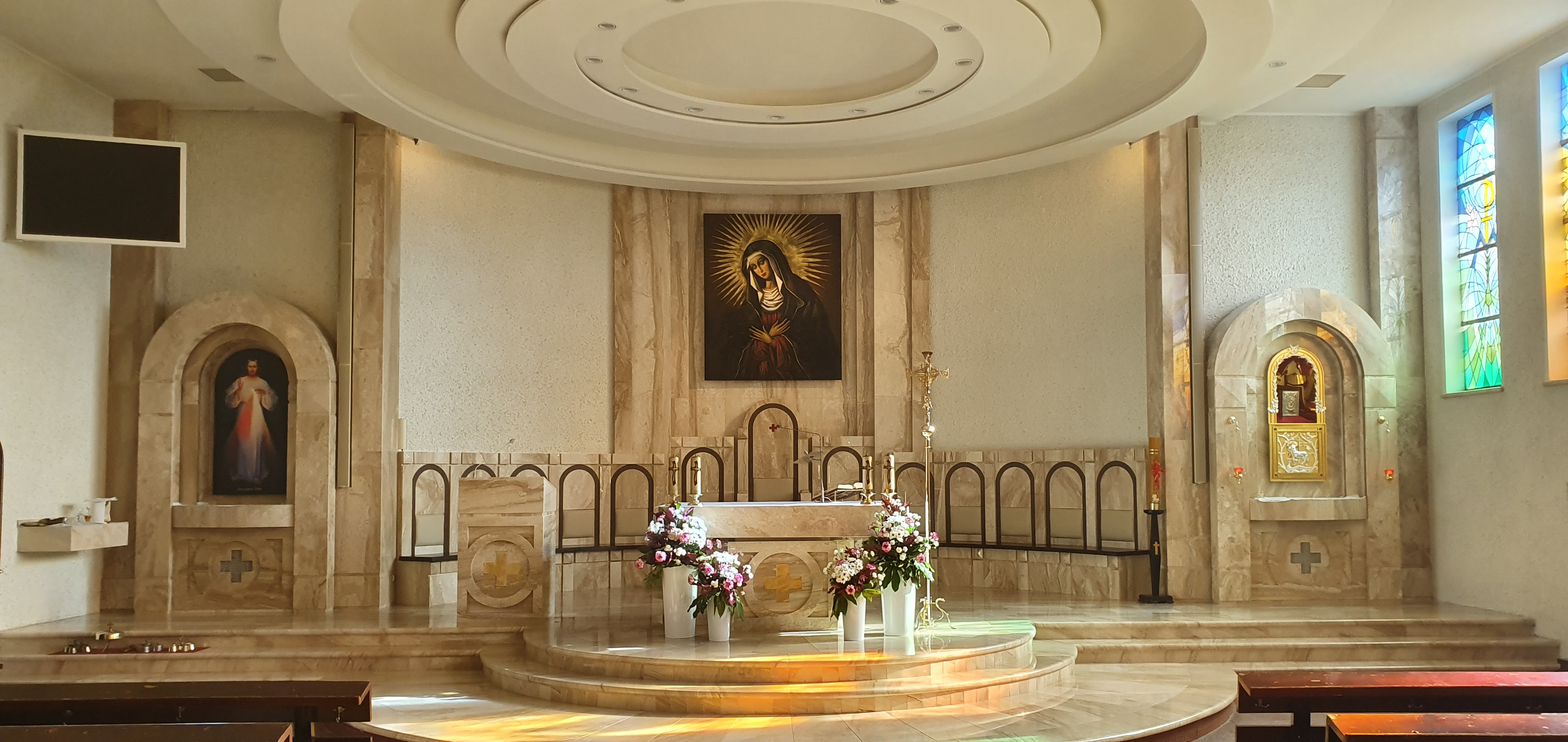 Wnętrze parafii MB Ostrobramskiej w Bydgoszczy